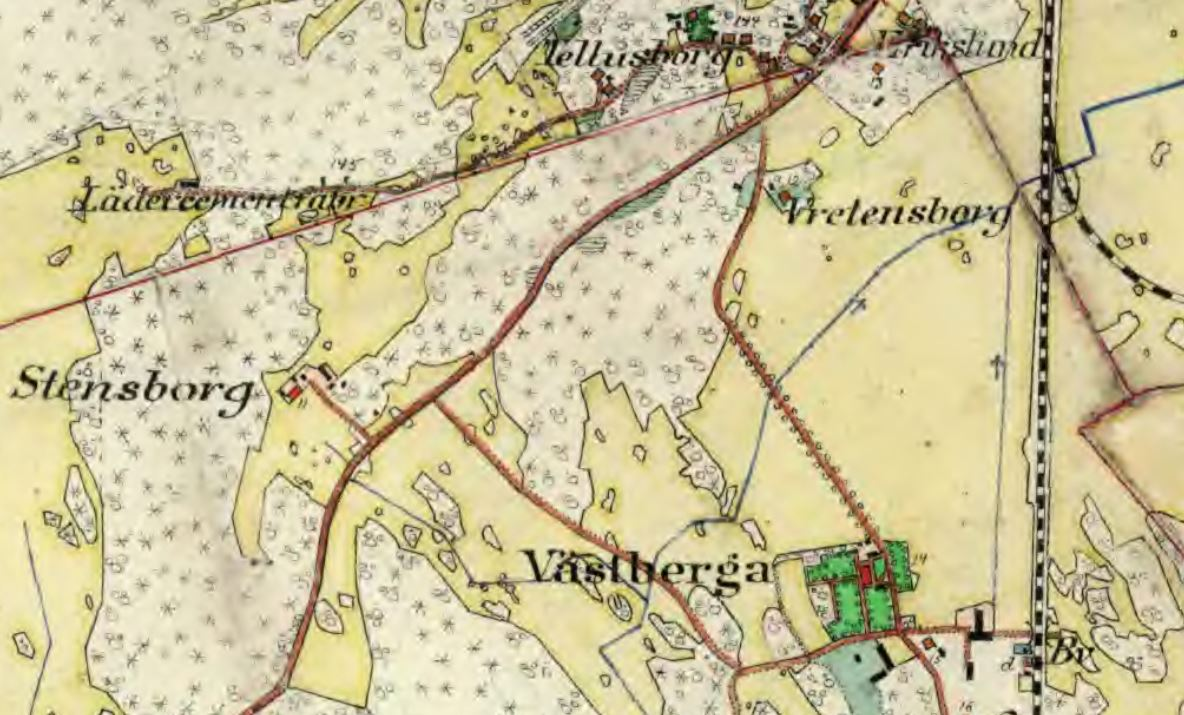 Västberga gård med torpen Stensborg och Vretensborg